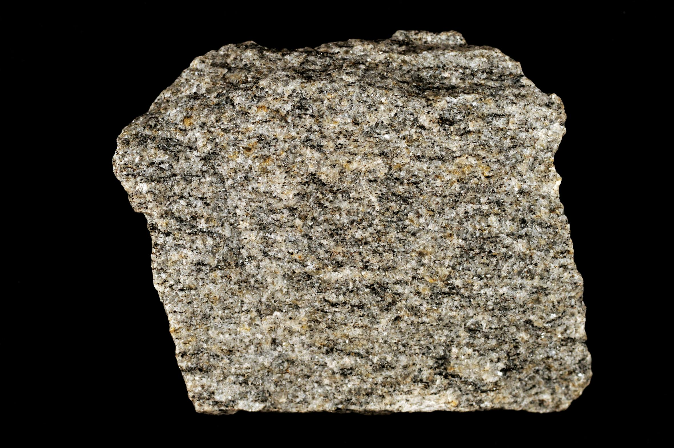 Photo: Anders Damberg Blekingens landskapssten, kustgnejsen, är gnejsig, det vill säga ”randig” i vitt och grått och består i huvudsak av kvarts och fältspat med inslag av biotit (en glimmer). Det är annars vanligt att gnejser är bandade i olika färger. Den kallas kustgnejs för att den uppträder nära kusten. Den är vanligast förekommande i västra Blekinge. Gnejsen bröts tidigare till gat- och kantsten. För knappt hundra år sedan, när det rådde ”stenfeber” i Blekinge, lyckades landskapets skickliga stenhuggare tukta den vrånga gnejsen med sina sneda klov till regelbundna block. Då var närmare 4 000 personer sysselsatta med att hugga sten i över tusen blekingska stenbrott. Idag används kustgnejsen som råvara för makadam.